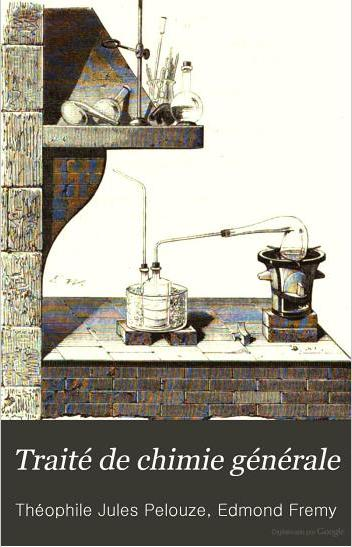 Traité de chimie générale